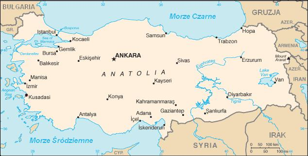 Mapa Turcji, polska wersja mapy z CIA World Factbook